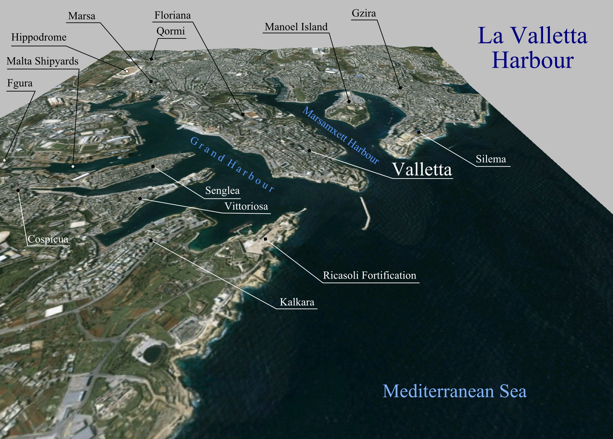 Prelucrare 3D pentru La Valletta Harbour.